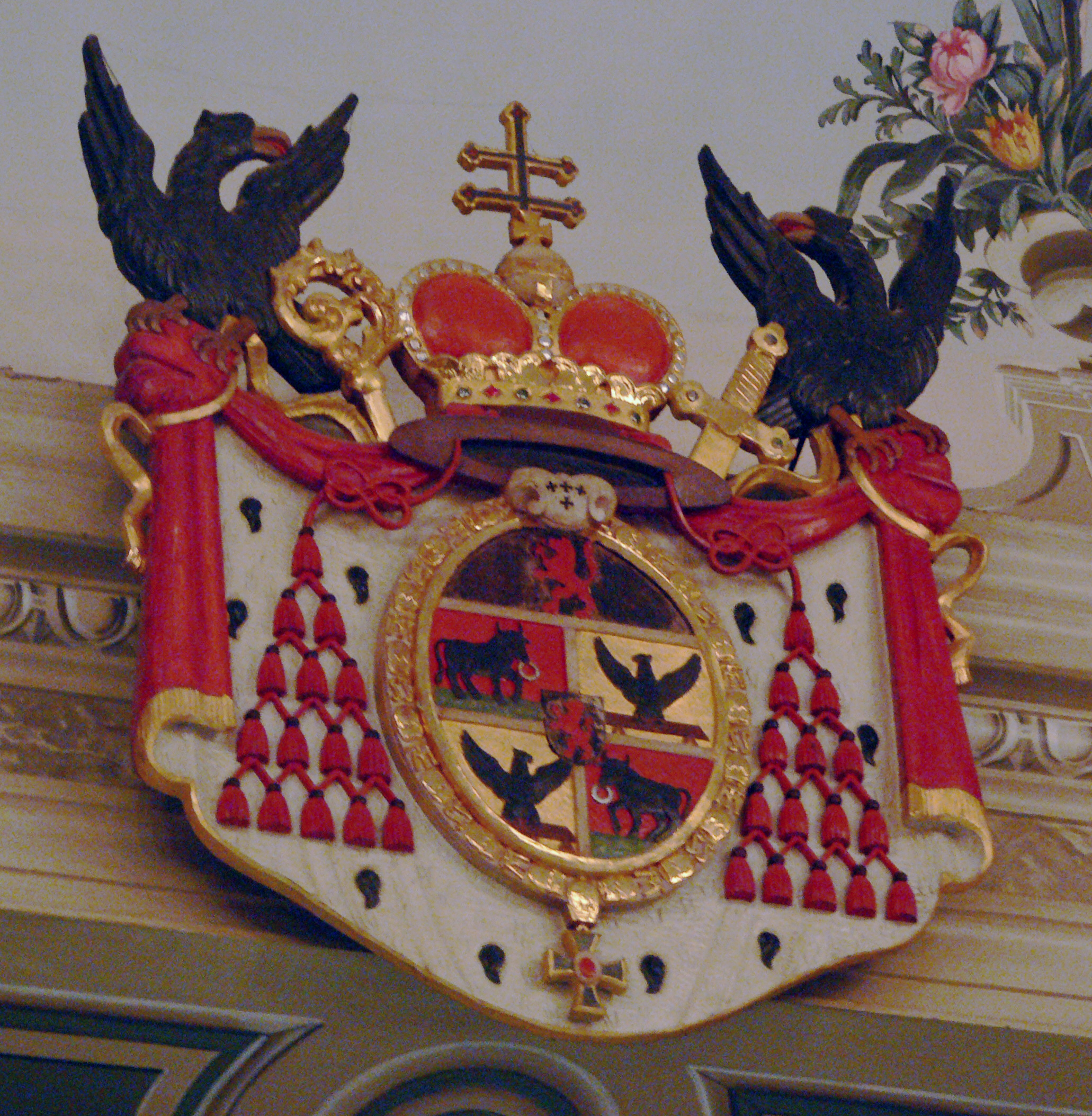 Passau, Stadttheater, Zuschauerraum: Wappen des Fürstbischofs Joseph Franz Anton von Auersperg am Bühnenportal